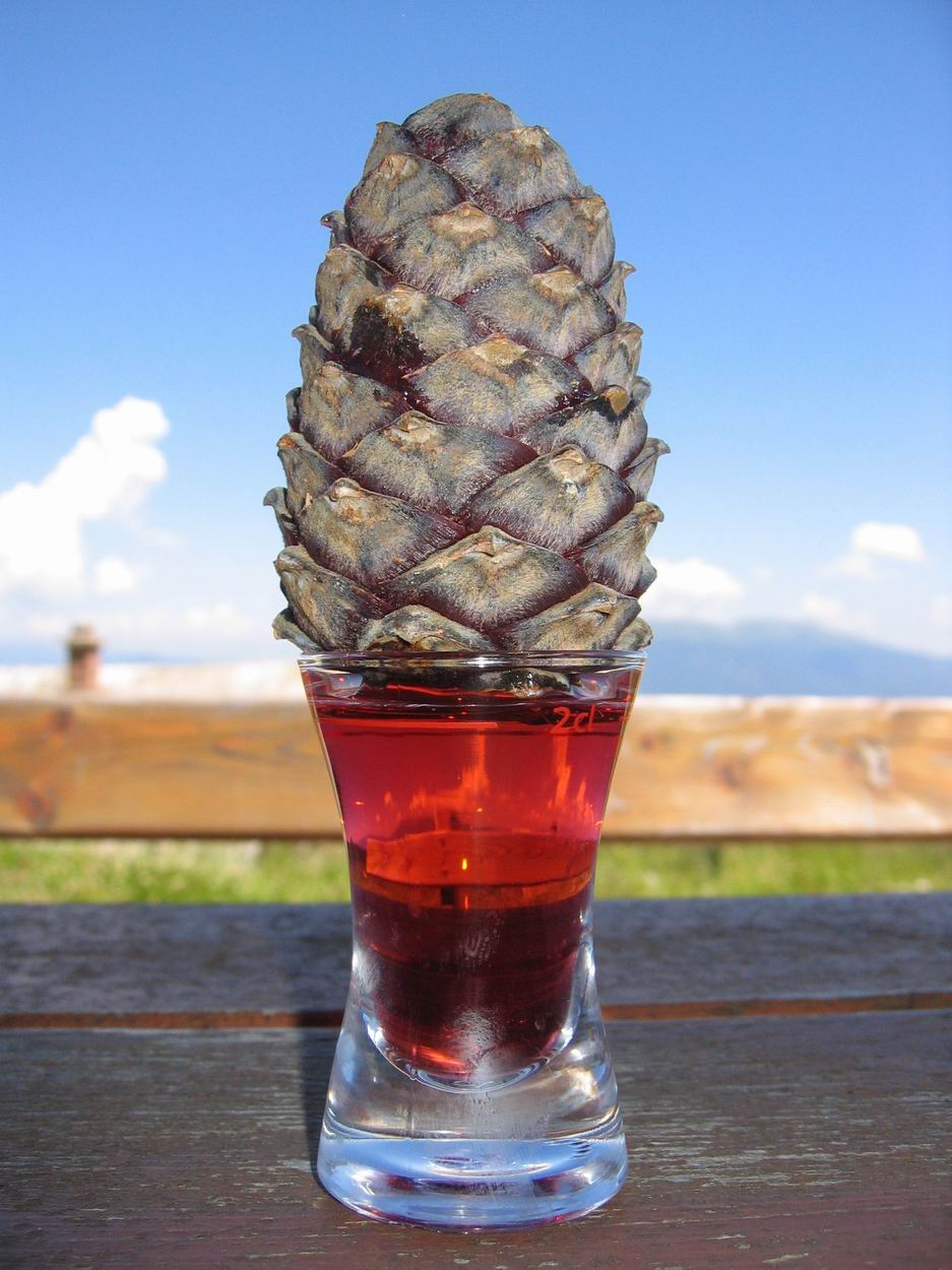 Zirbenschnaps